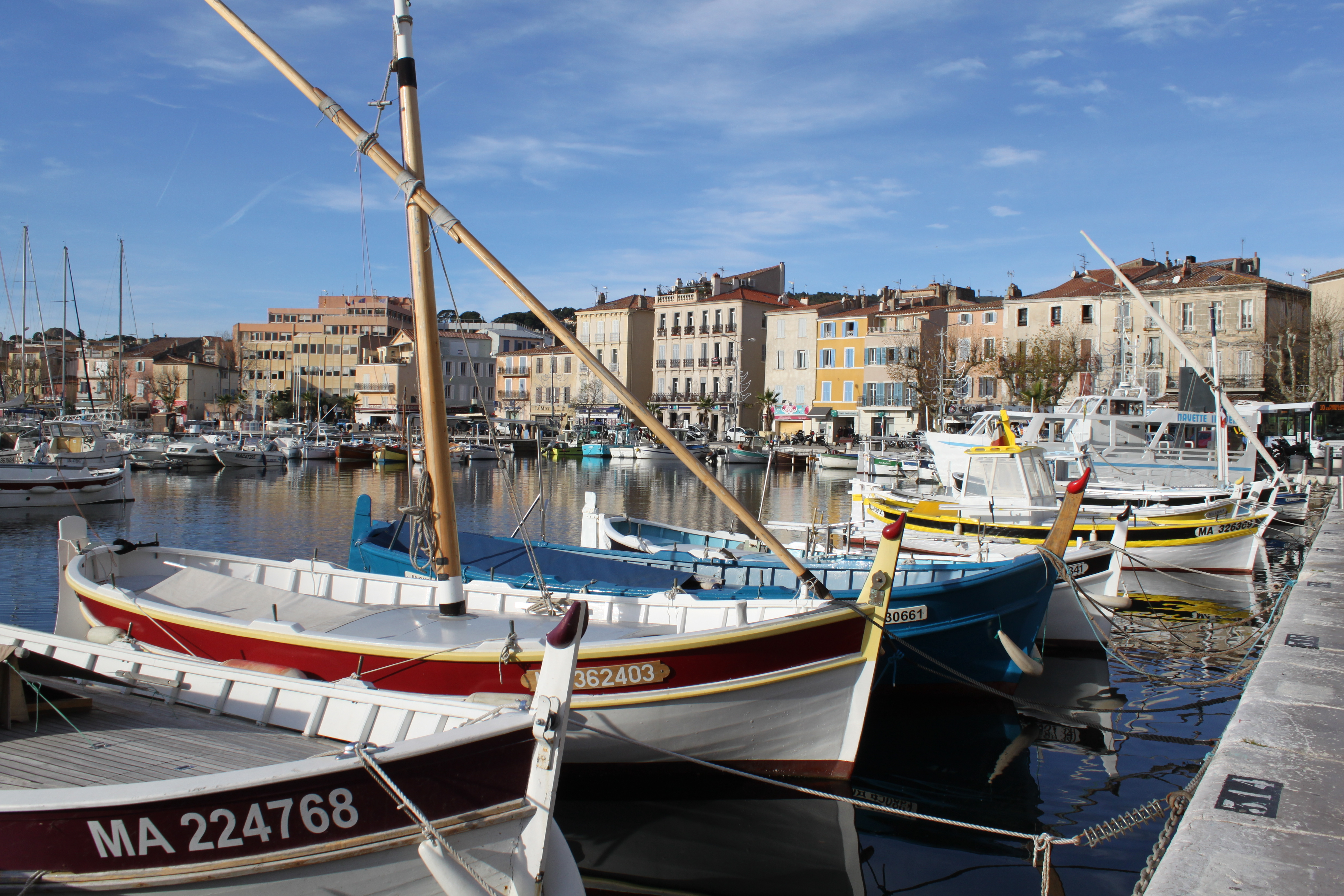 La Ciotat - Marina